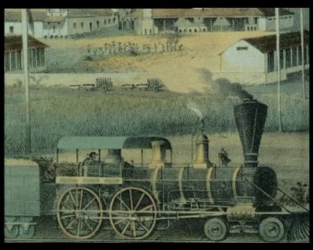 Ferrocarril La Habana-Güines (1837), primer ferrocarril de Hispanoamérica y de España.